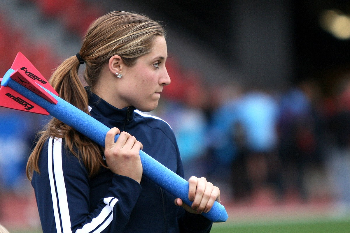 Javelin. USA Champion. Weltklasse Zurich